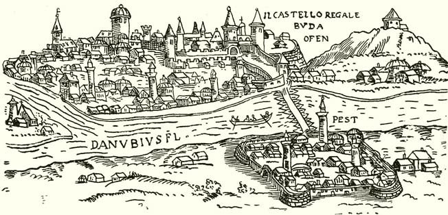 MÁRKI SÁNDOR DÓSA GYÖRGY 1470-1514 A MAGYAR TUDOMÁNYOS AKADÉMIA SEGÉLYEZÉSÉVEL KIADJA A MAGYAR TÖRTÉNELMI TÁRSULAT SZERKESZTI DR. DÉZSI LAJOS BUDAPEST AZ ATHENAEUM R.-T. KÖNYVNYOMDÁJA 1913